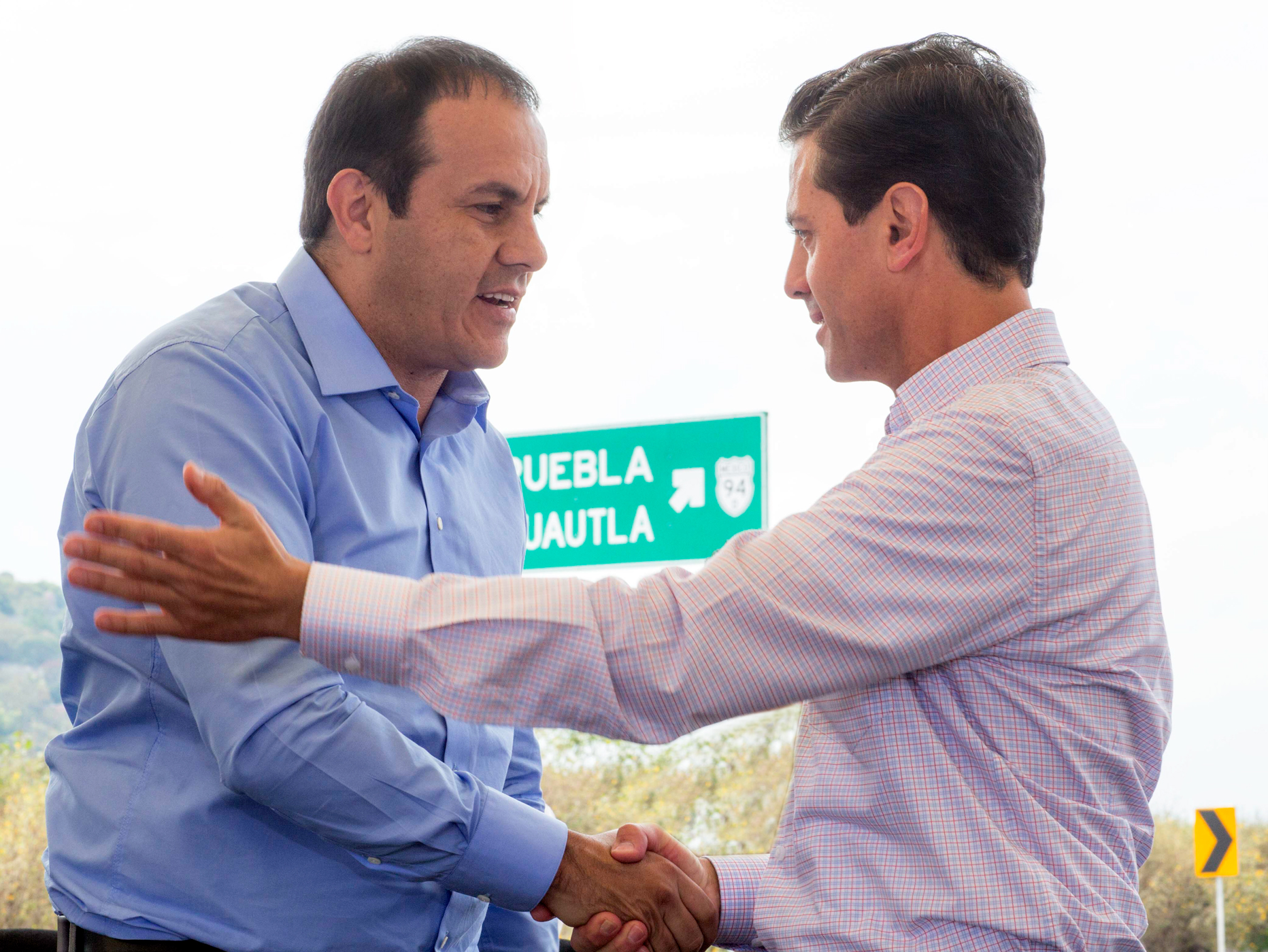 El presidente de México, Enrique Peña Nieto (derecha), y el gobernador de Morelos, Cuauhtemoc Blanco (izquierda), en la entrega de la Autopista Siglo XXI.